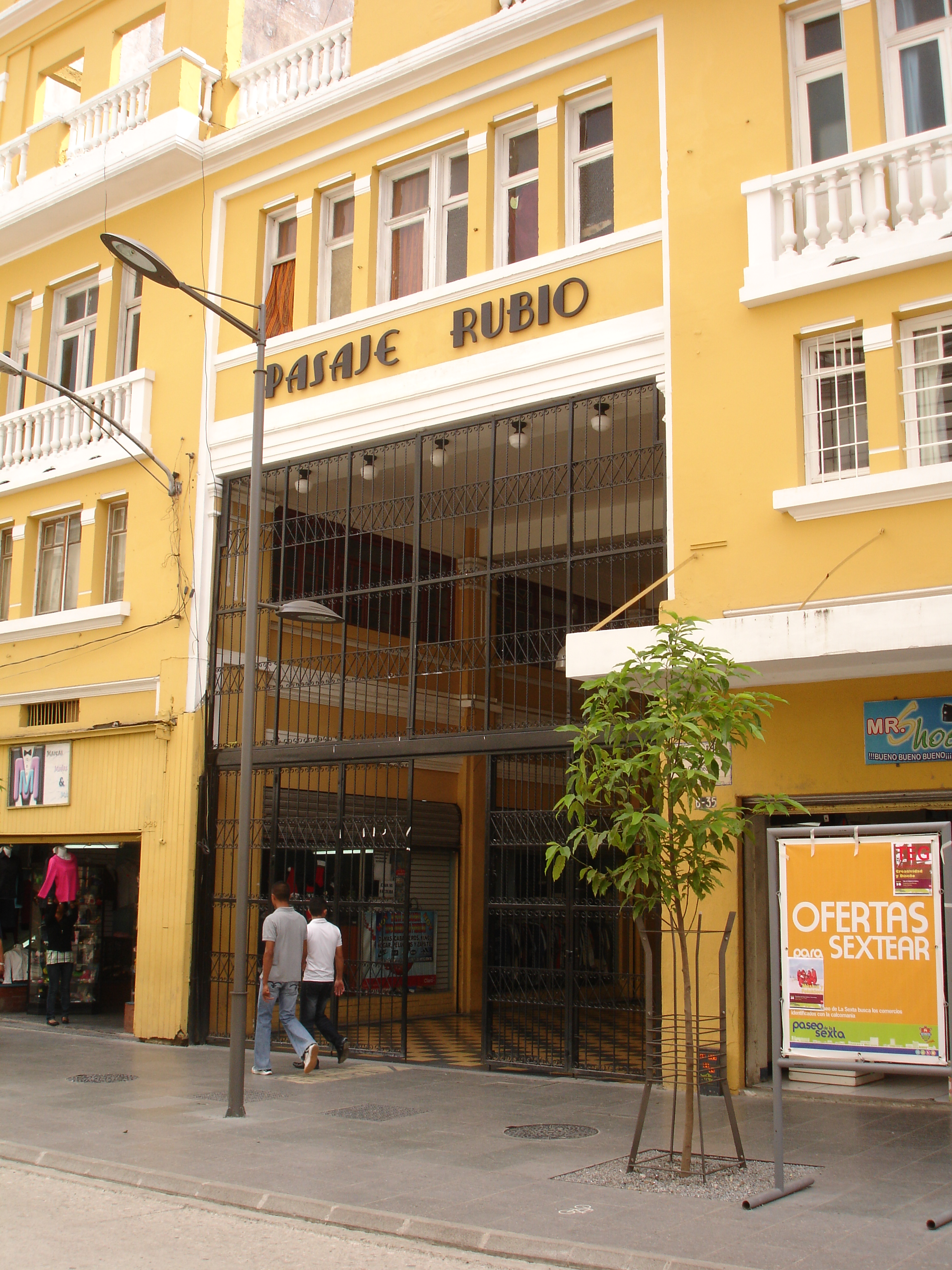 Ubicado en zona 1, Ciudad de Guatemala